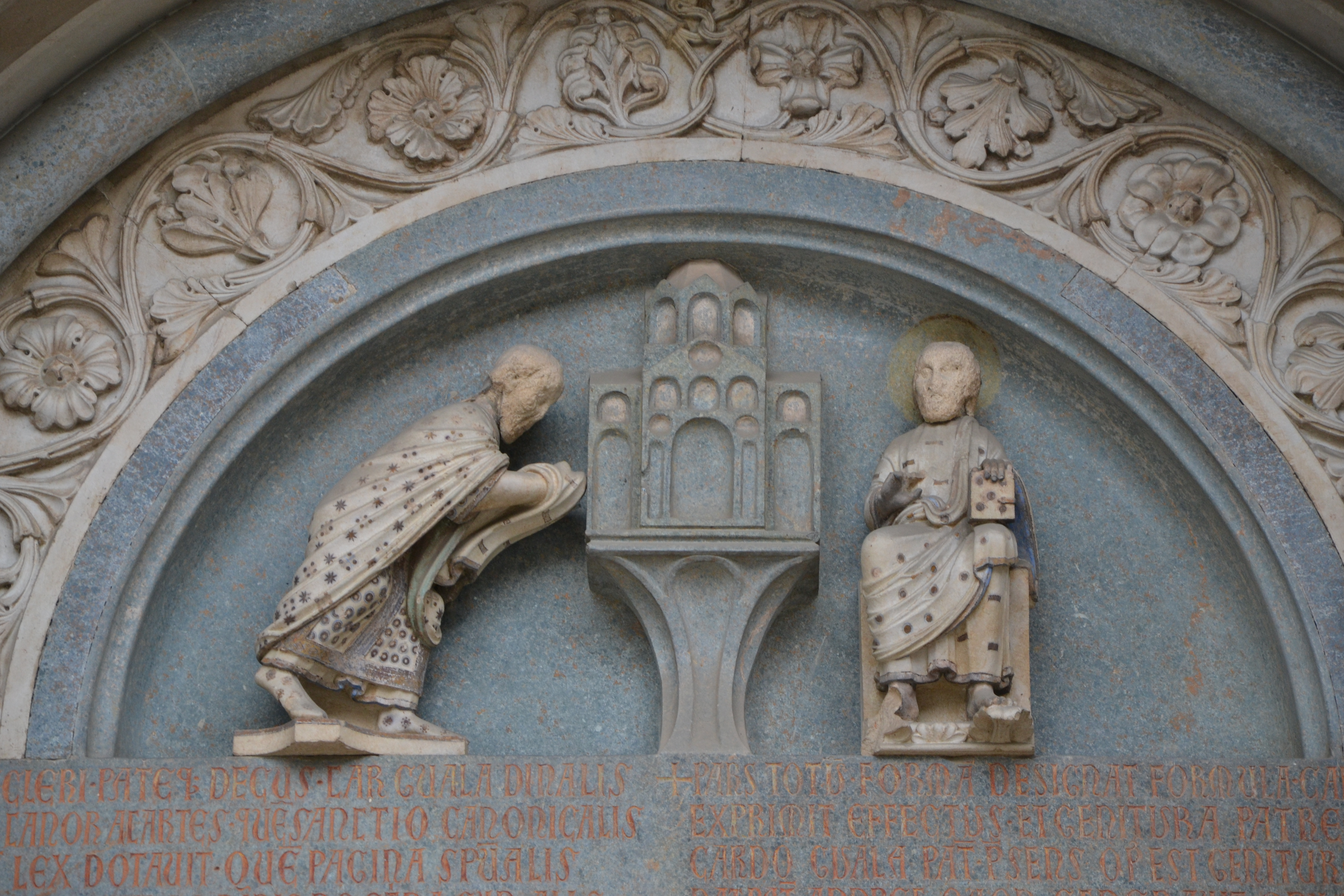 Nella lunetta di sinistra la scena del cardinale Guala Bicchieri che offre la chiesa a Sant'Andrea in trono. Una scritta dedicatoria incisa sull'architrave inizia col verso Lux cleri patriaeque decus e prosegue con un ampio elogio del virtù del cardinale This is a photo of a monument which is part of cultural heritage of Italy.